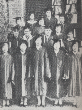 1920년대의 이화여전 졸업사진